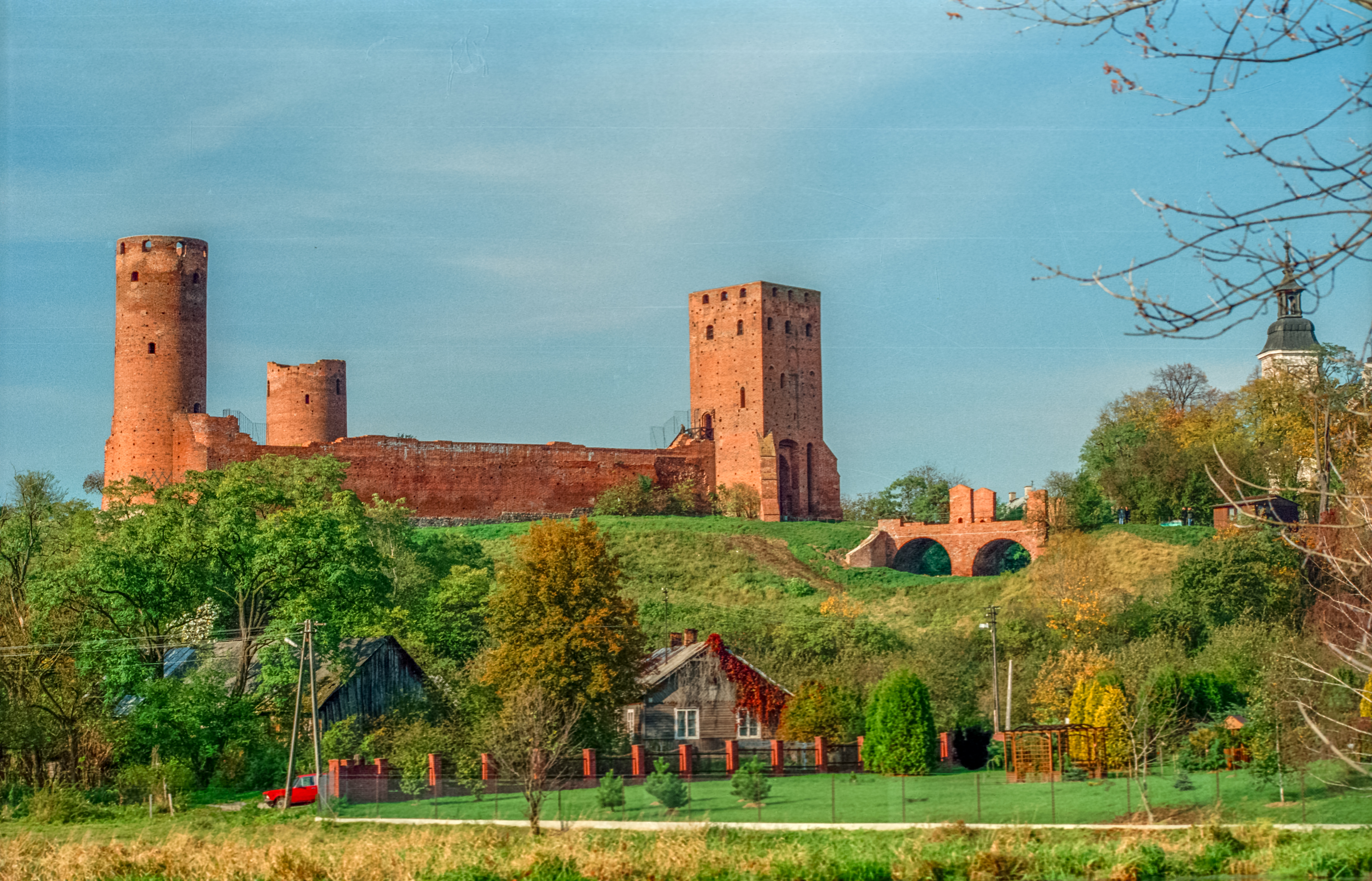 Czersk